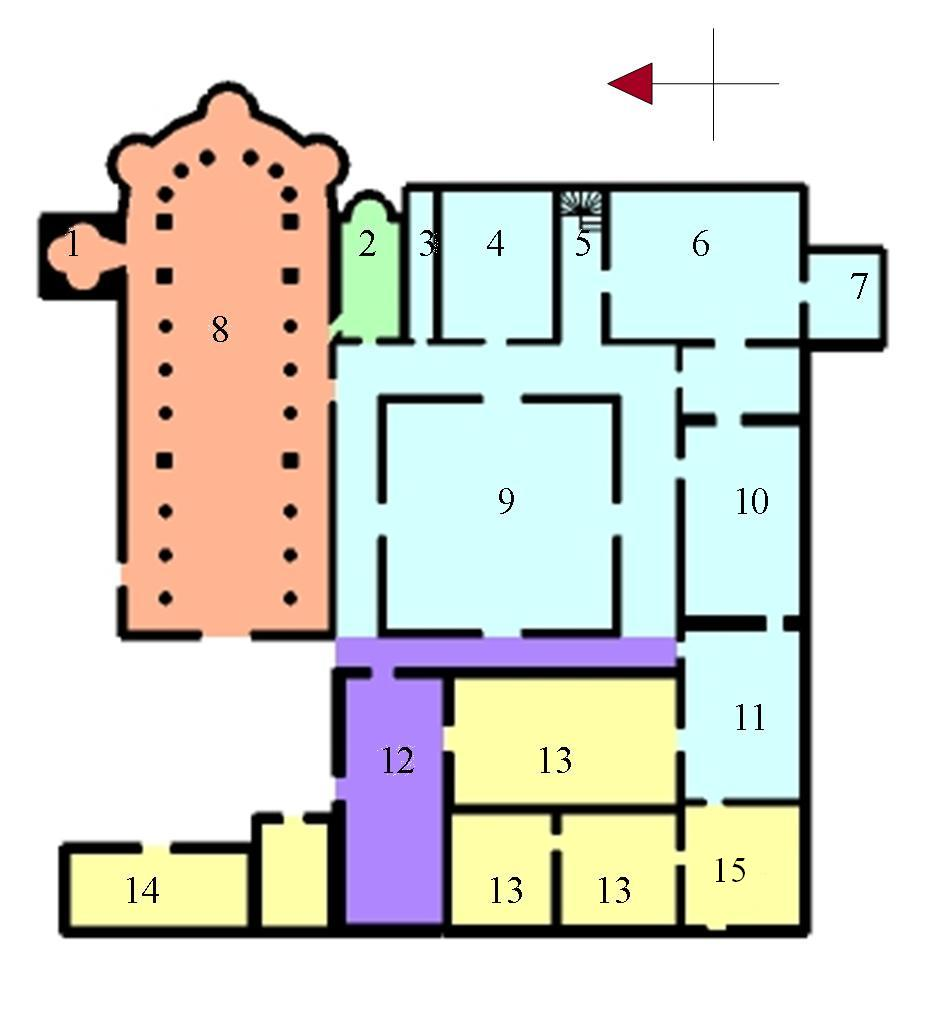 Legenda: 1_campanile 2_sagrestia 3_tesoro 4_pianterreno: Sala Capitolare; piano superiore: dormitorio del monaci; 5_scala per il piano superiore; 6_biblioteca; 7_scrittorio; 8_chiesa abbaziale; 9_chiostro; 10_refettorio; 11_cucina; 12_foresteria; 13_pianterreno magazzini; piano superiore dormitorio dei conversi; 14_panetteria. Arancione: chiesa e campanile Verde:cappella carolingia (sagrestia) Celestino: area riservata ai monaci; Viola: area riservata ai forestieri; Giallo crema: stanze di servizio